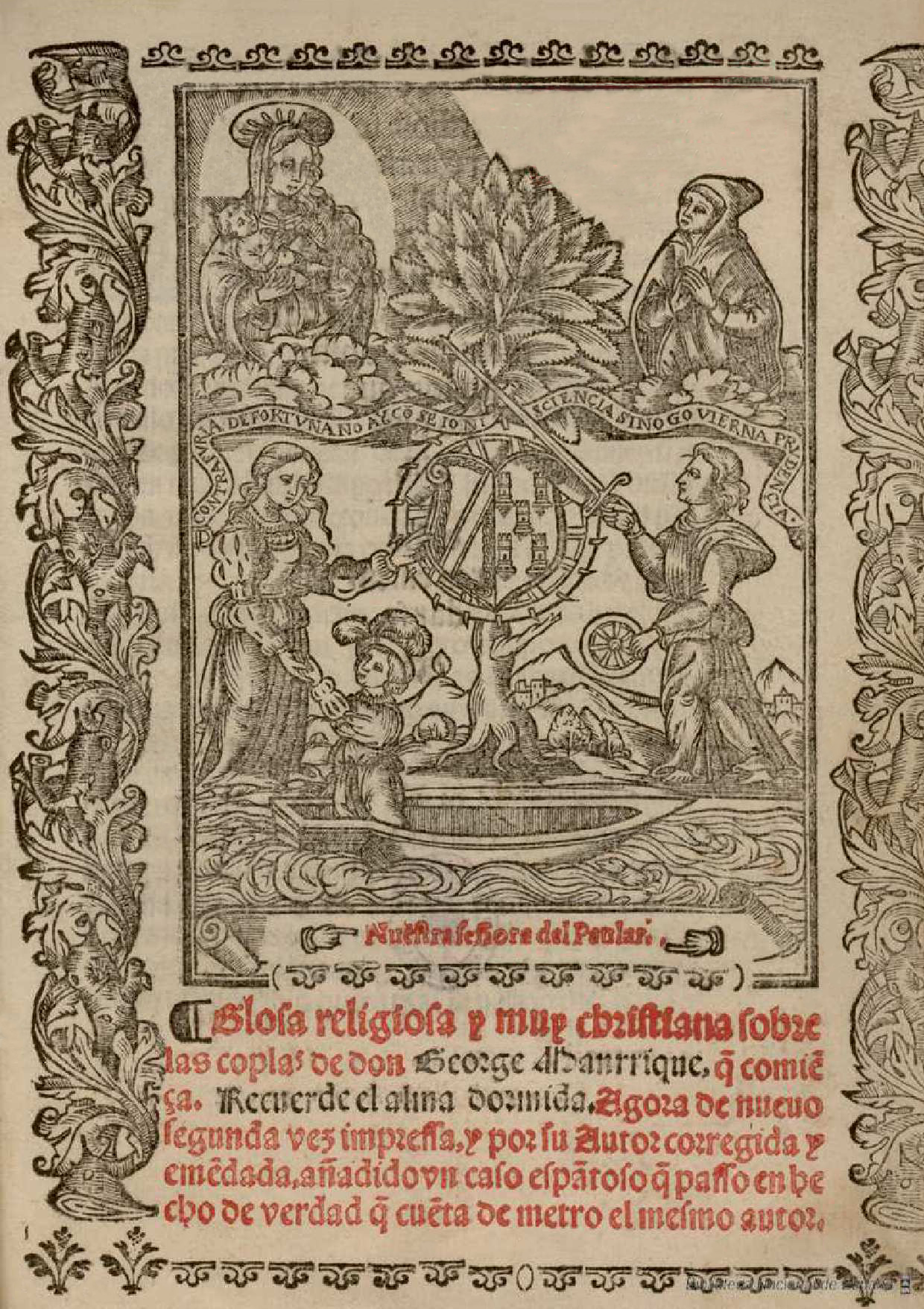 Portada de la "Glosa a las Coplas de Jorge Manrique y otros versos". Edición de 1560, impreso en Alcalá de Henares por Juan de Brocar.